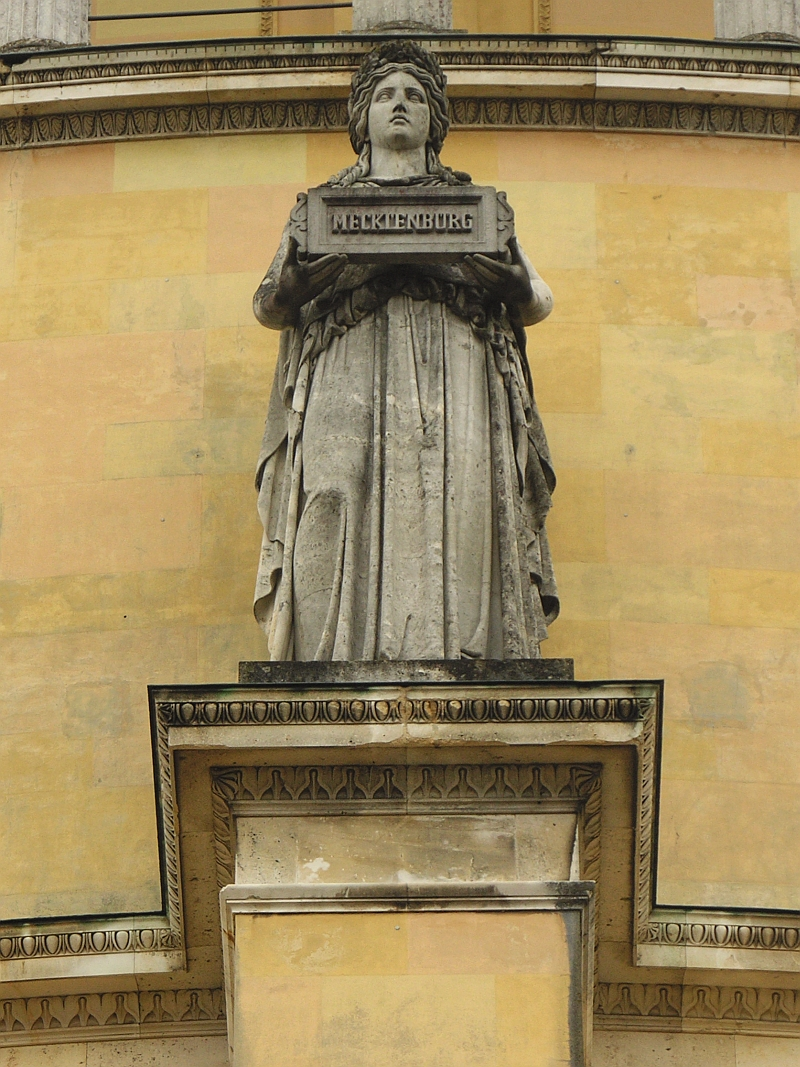 Diese Statue an der Aussenseite der Befreiungshalle in Kelheim steht für den Volksstamm aus Mecklenburg, Höhe der Statue 580 cm. Sie ist eine von 18 Statuen, die nach Modellen des Bildhauers Johann Halbig geschaffen wurden